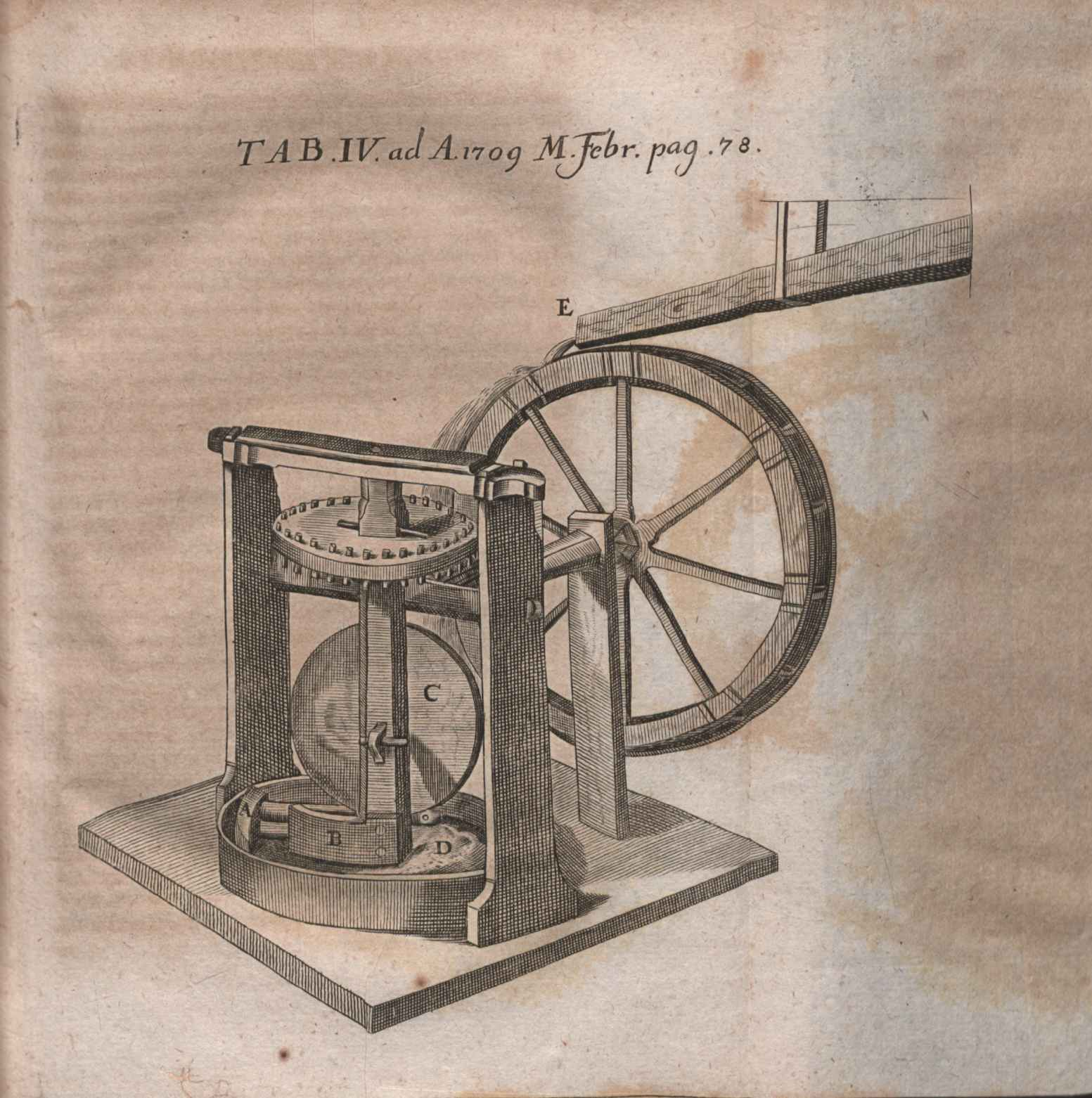 Illustration